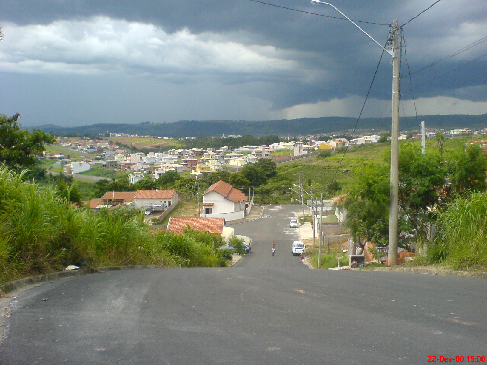 vista dos bairros e condomínios de Valinhos